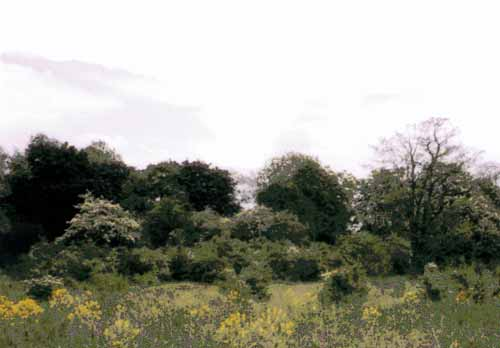 Brachfläche nach 9-10 Jahren